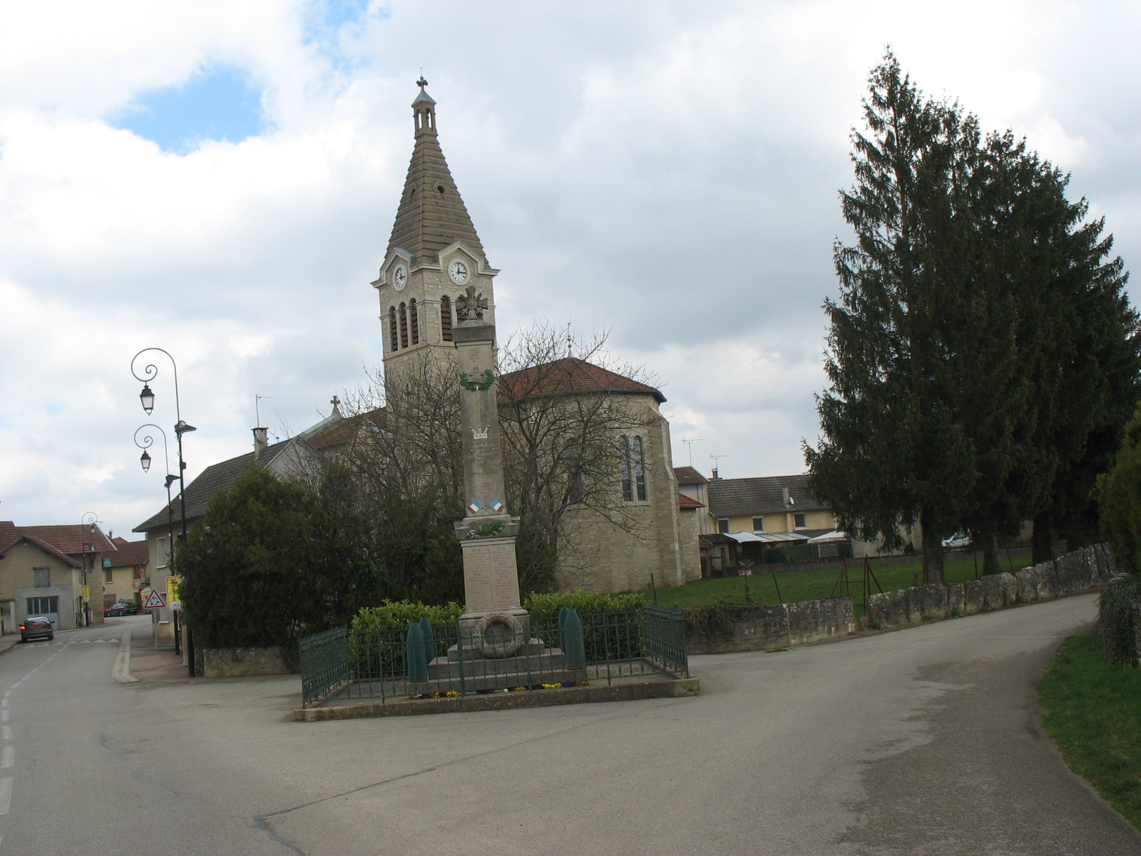 eglise optevoz et monument aux morts